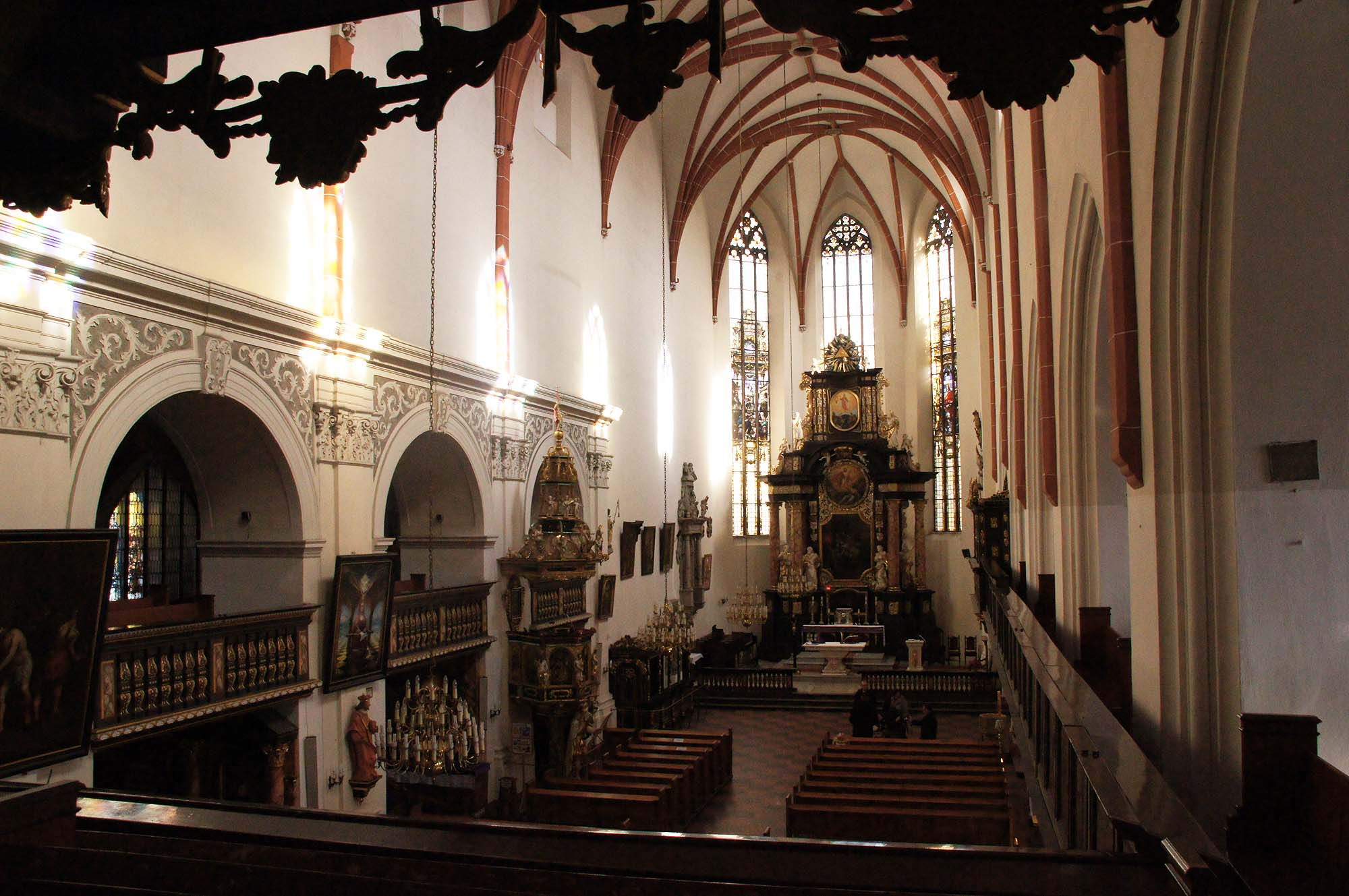 Oleśnica, kościół par. p.w. św. Jana Apostoła, kon. XIII, XIV, XVI, pocz. XX